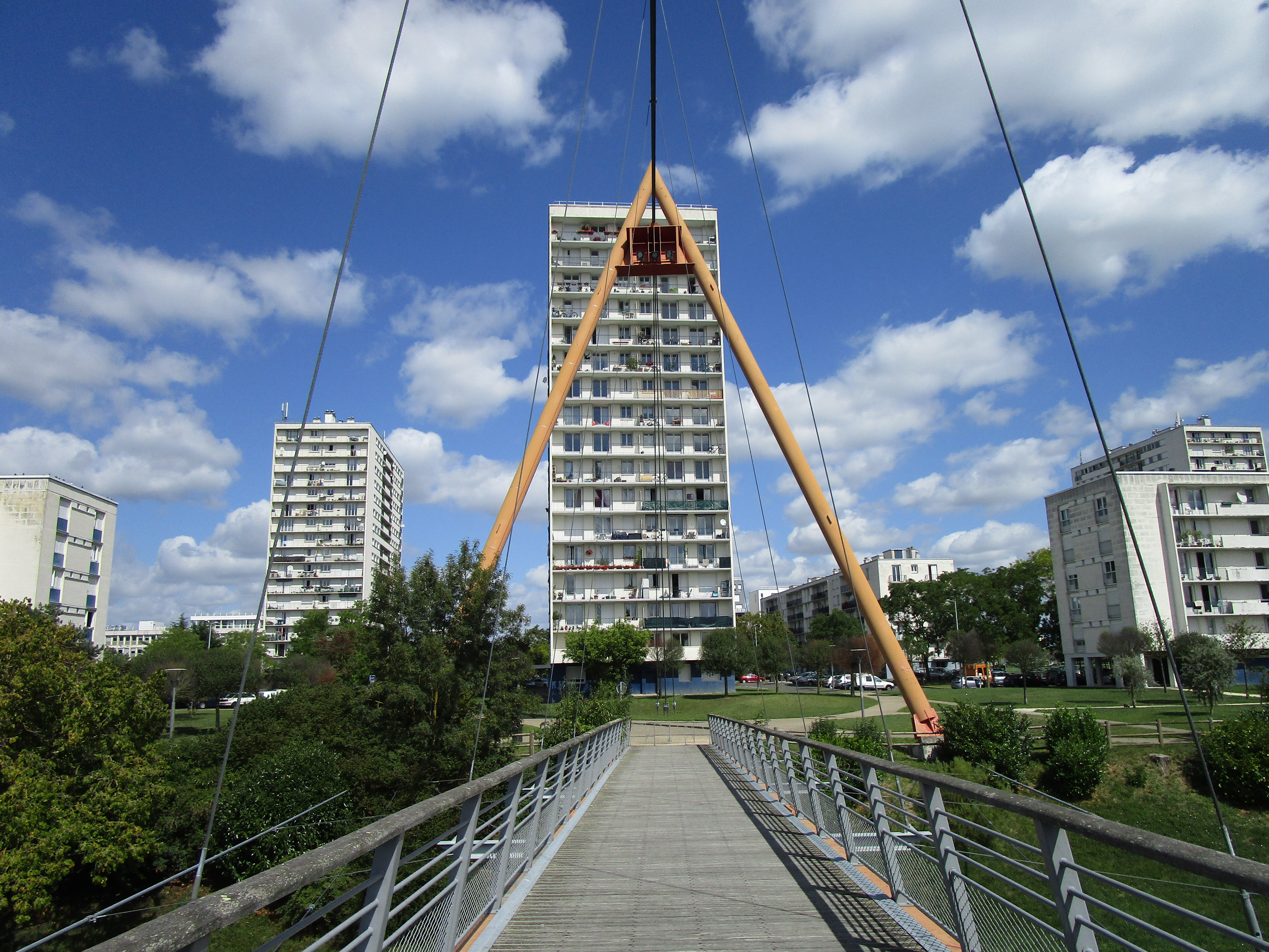 Le quartier des Rives du Cher et le pont du fil d'Ariane, à Tours.